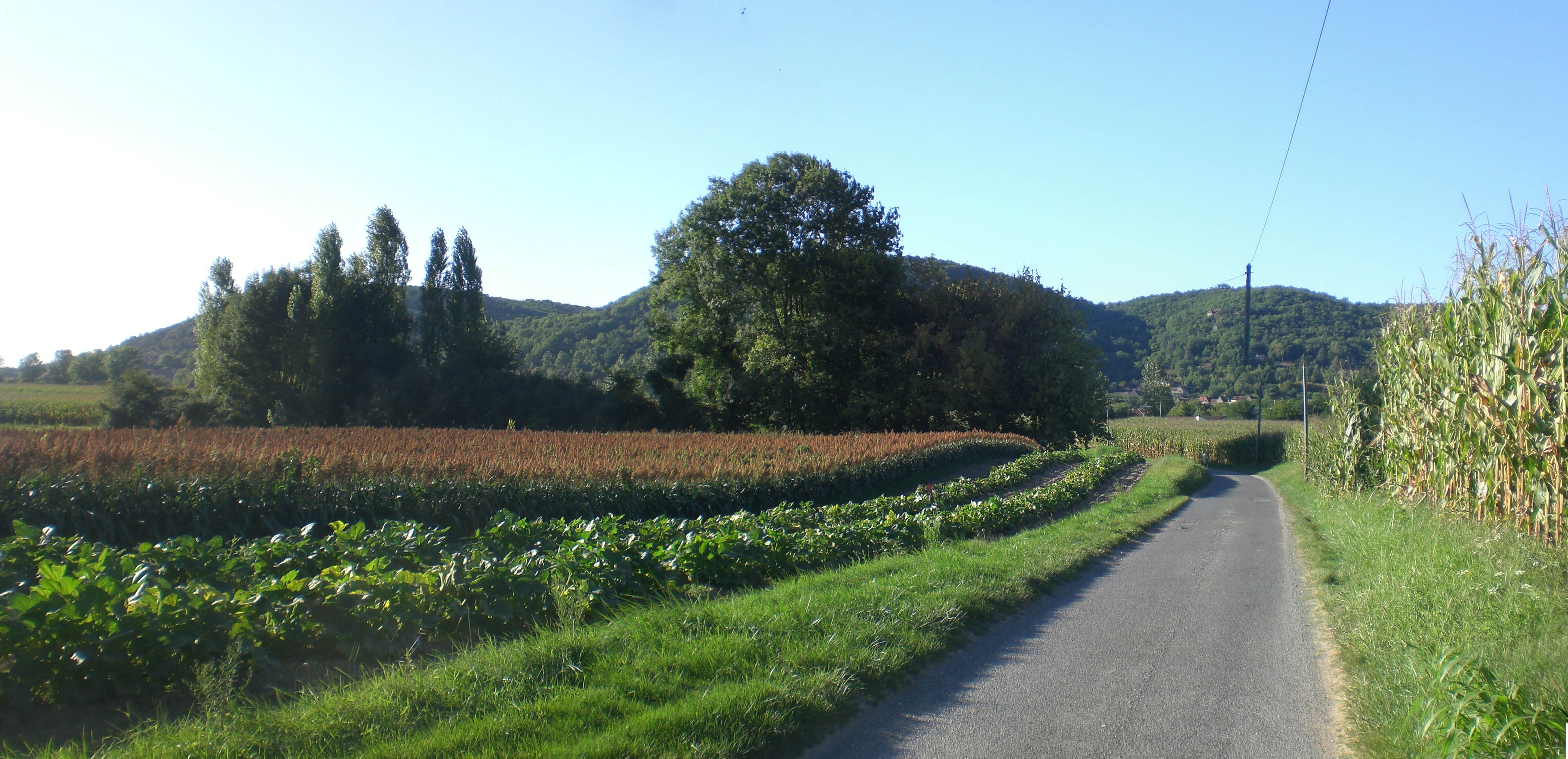 La Plaine de Saint-Vincent-De-Cosse, au niveau du secteur d'Enveaux.